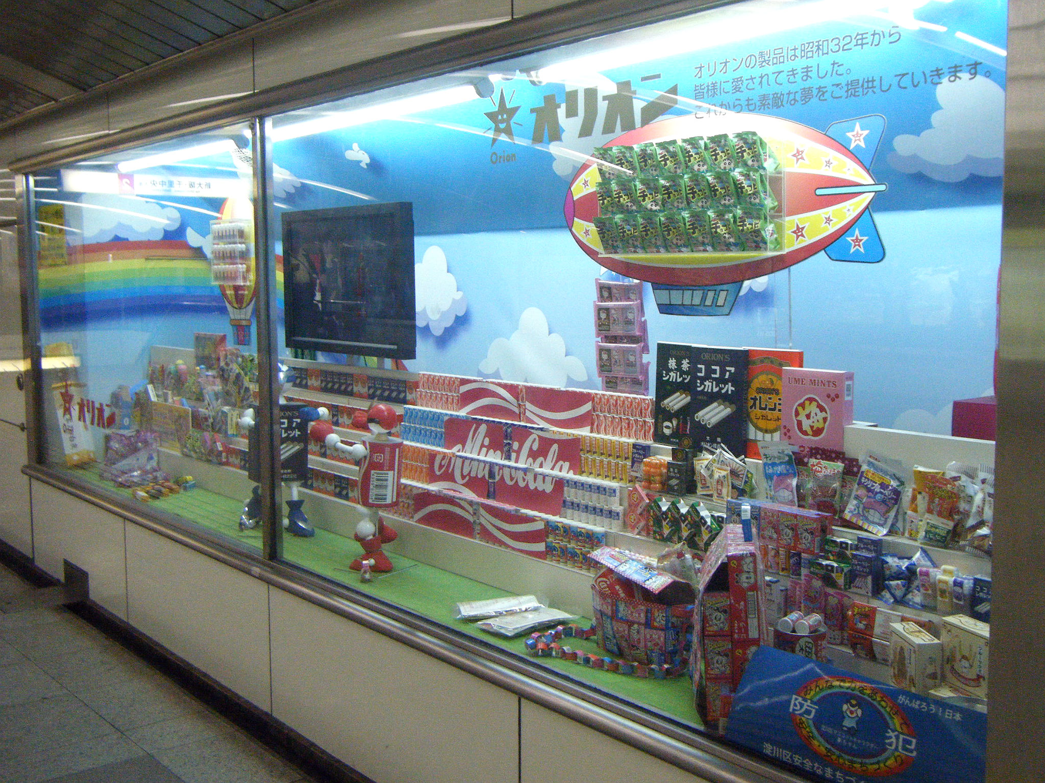 オリオン株式会社 ショーウィンドー 地下鉄御堂筋線梅田駅・北改札口内